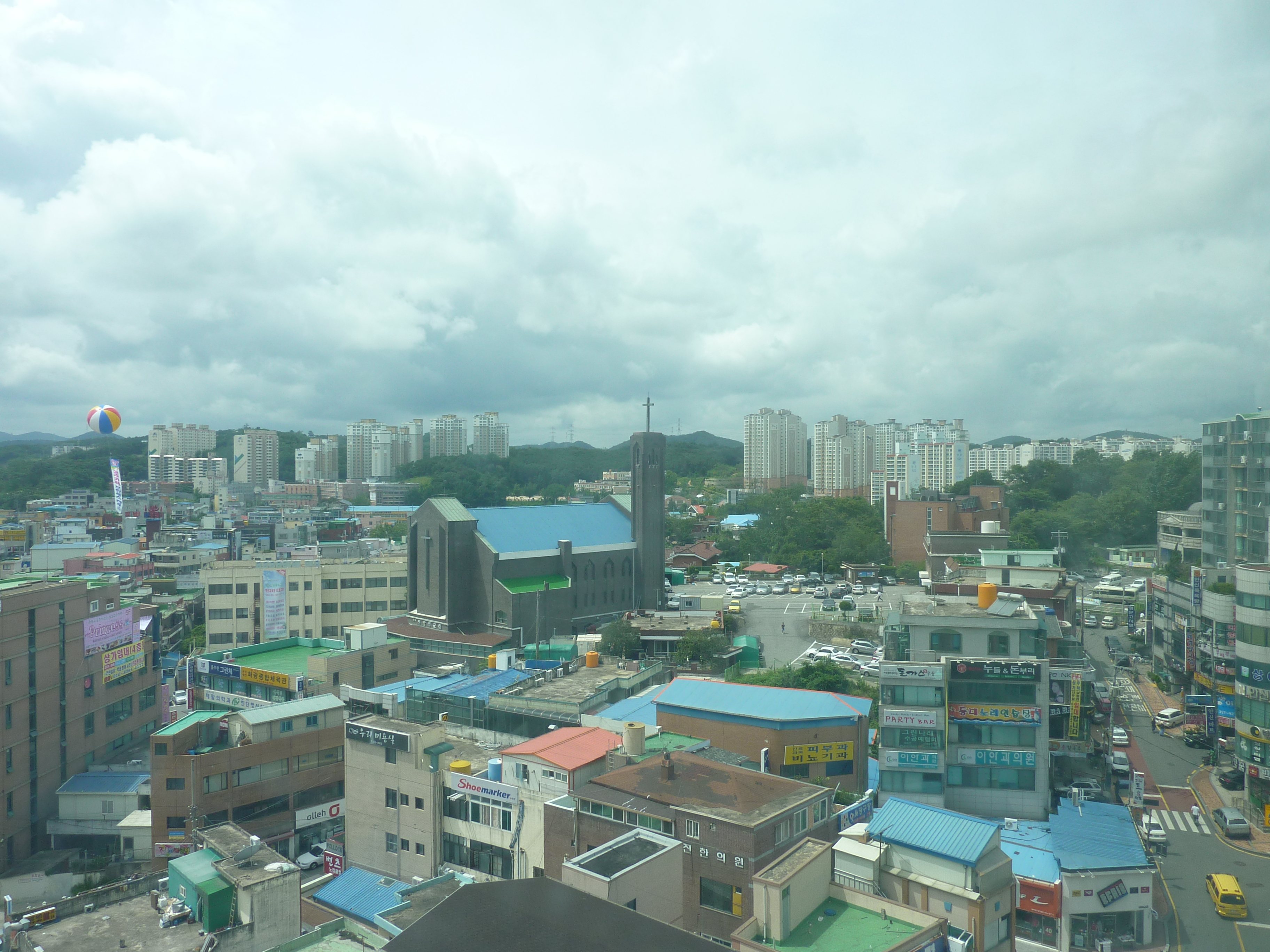 韓国忠清南道唐津市 市街地その２